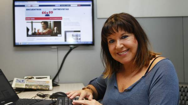 Loles León, en la redacción de 20minutos.